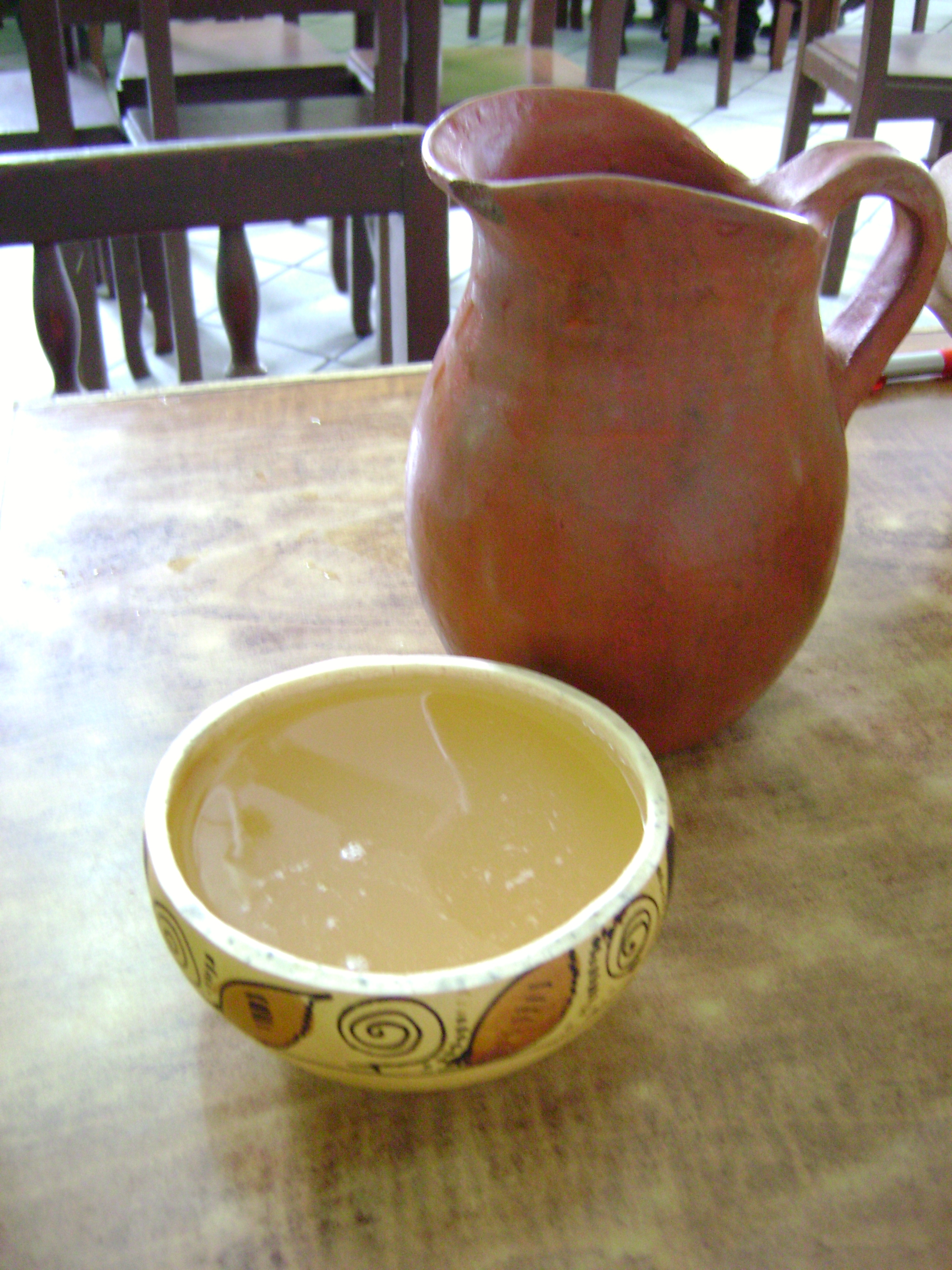 Clarito (chicha de jora de sabor suave) servido en un envase conocido como "poto". Catacaos, Piura, Perú.